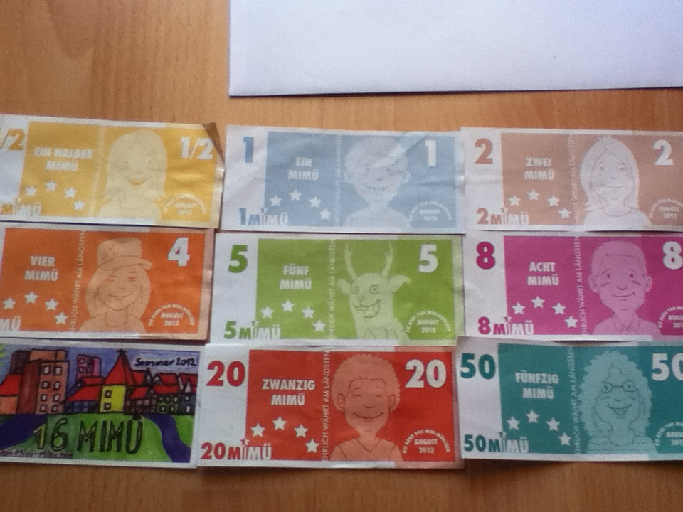 Mimu-Scheinsatz des Jahres 2012